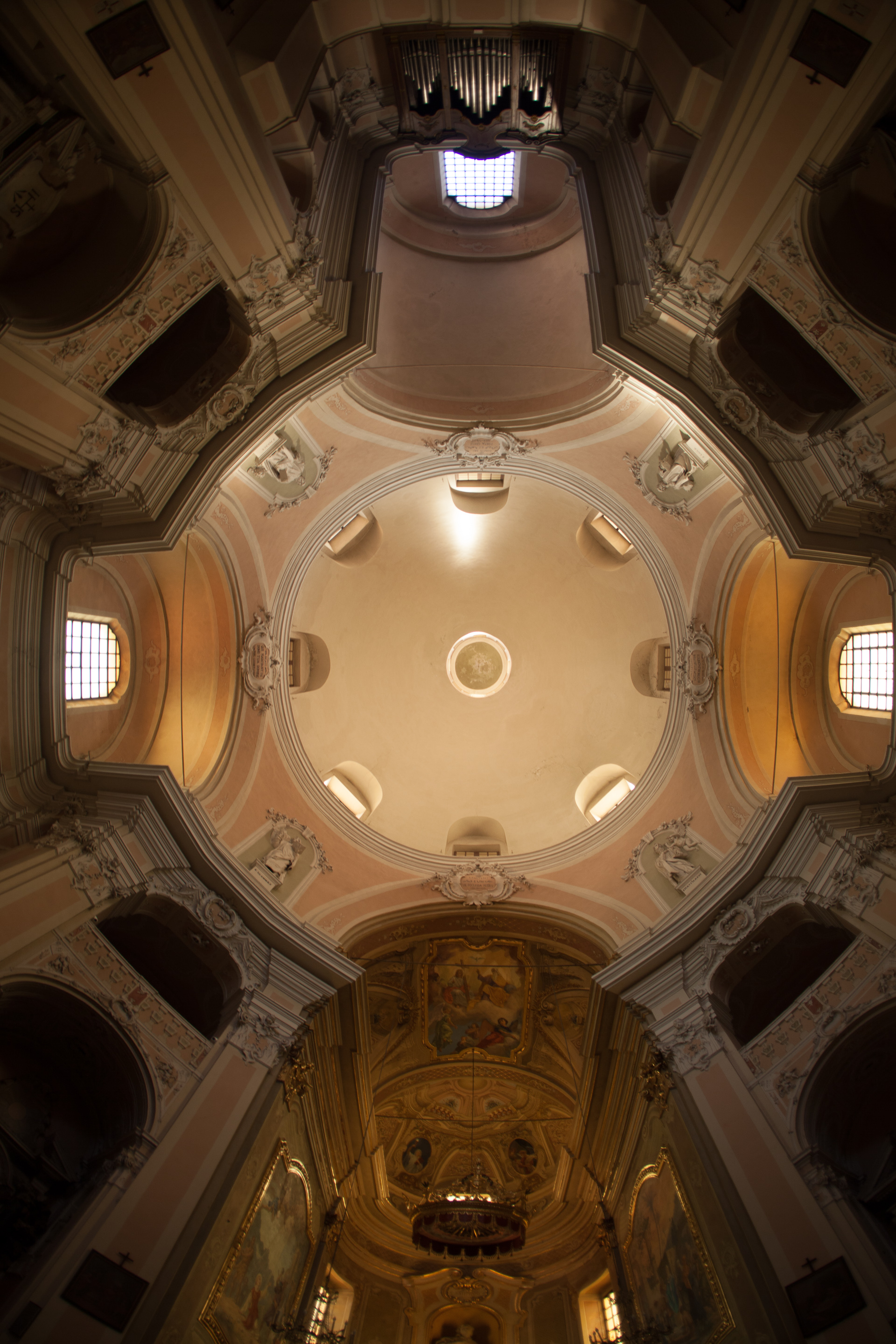 Santo Stefano, la cupola col fish-eye. This is a photo of a monument which is part of cultural heritage of Italy.